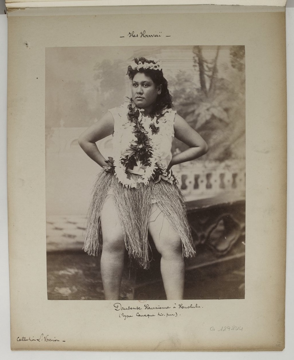 Vue 23. Recueil. Îles Hawaï. III. Types. Documents iconographiques rassemblés par Louis Pierre Vossion.